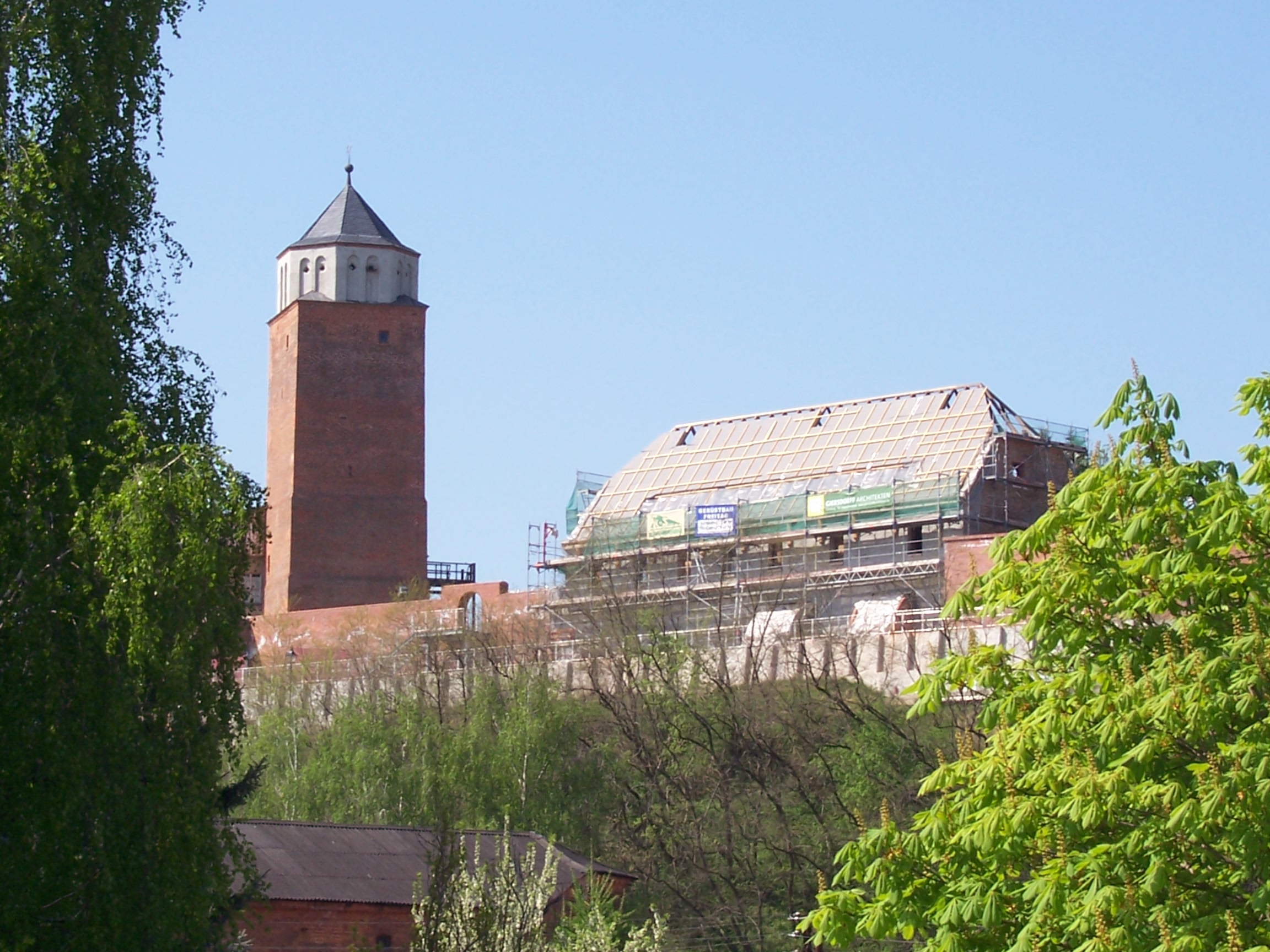 Burg Eilenburg während der Dachstuhlsanierung des alten Gefängnisses